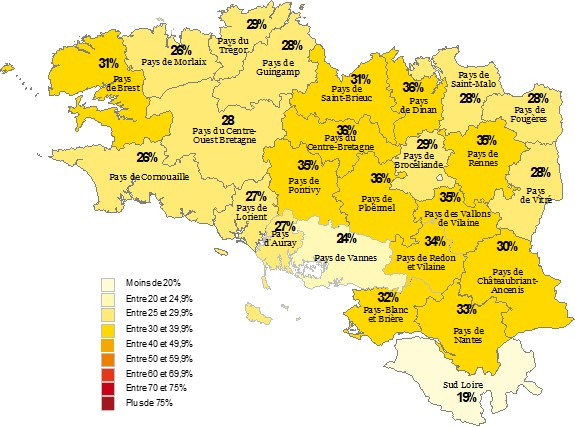 Pourcentage de personnes favorables ou très favorables à la signalisation routière français/gallo